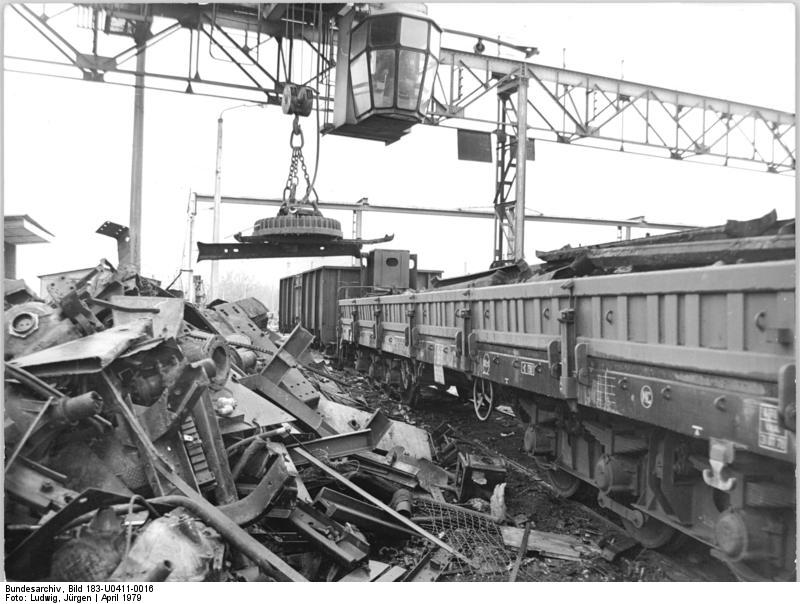 ADN-ZB-Ludwig-11.4.79-Erfurt: Aus alt wird neu, so auch aus dem Schrott, der hier auf dem Lagerplatz des VEB Metallaufbereitung Erfurt für den Transport in die Stahlwerke verladen wird. Eine hohe Qualität bei der Aufbereitung und das kontinuierliche Bereitstellen des Sekundärrohstoffes - täglich verlassen rund 20 Waggons den Lagerplatz für Schwarzmetalle - sind Wettbewerbsziele der Werktätigen. Drei Vietel des Materialeinsatzes in den Stahlwerken der Republik wird durch den Sekundärrohstoff Schrott gedeckt.- siehe auch U 0411-N